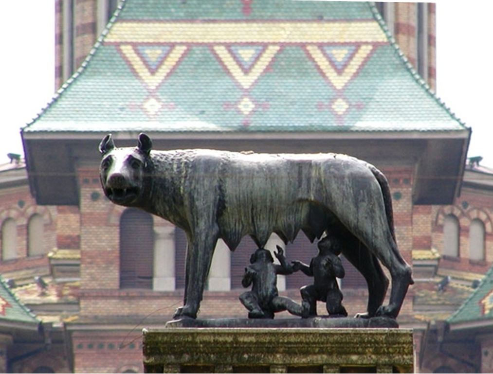 Lupa Capitolina Timisoara 2003